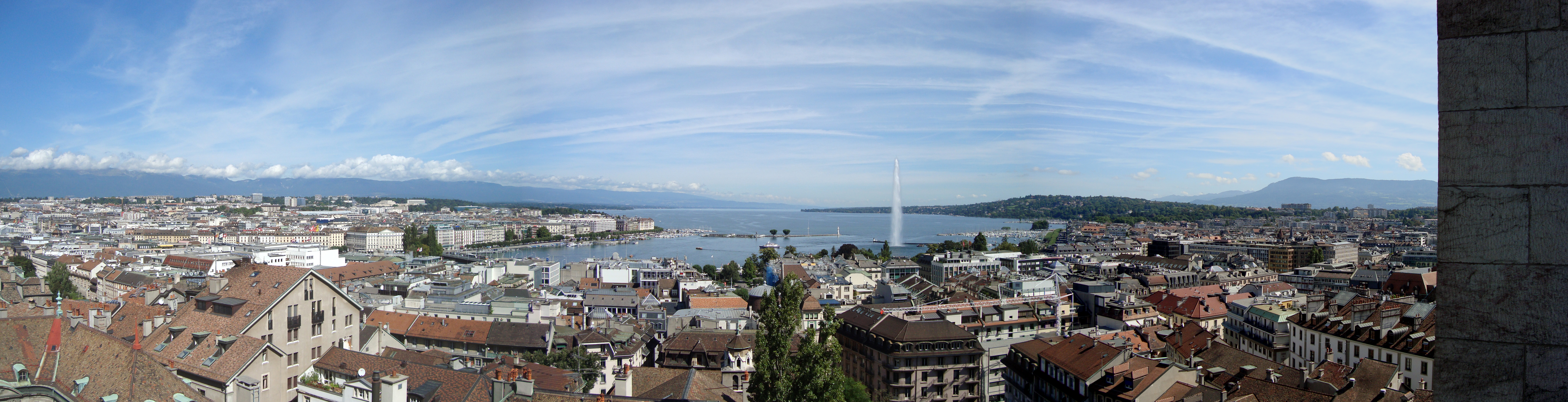 Panorama über die Stadt Genf und den Jet d'Eau